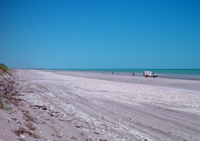 80 mile beach 29-4-2004